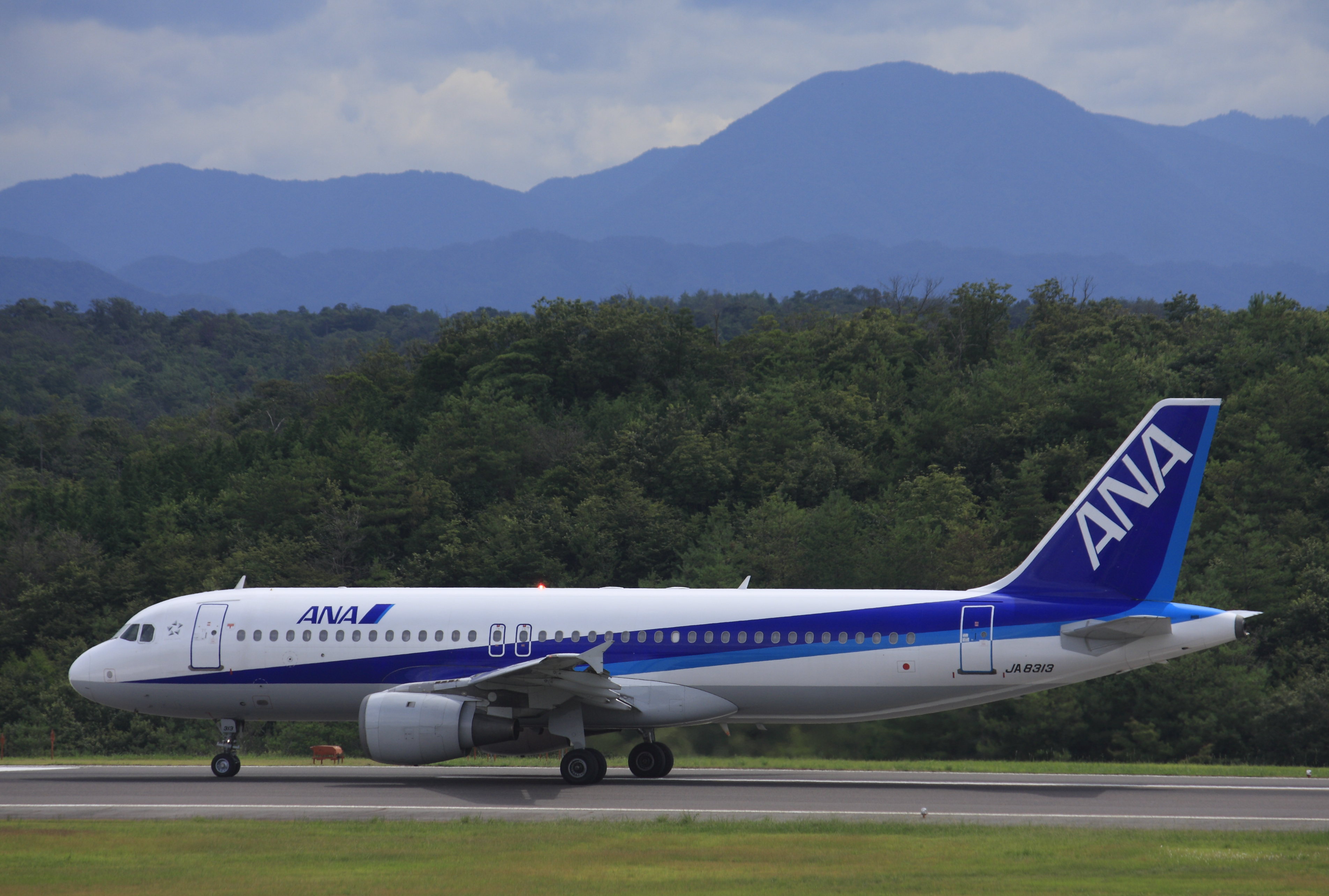 全日本空輸 エアバスA320-211 JA8313 石見空港